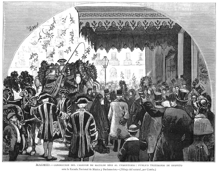 Conducción del cadáver de Matilde Díez al cementerio, público testimonio de respeto, de Juan Comba, publicado en la revista española La Ilustración Española y Americana.